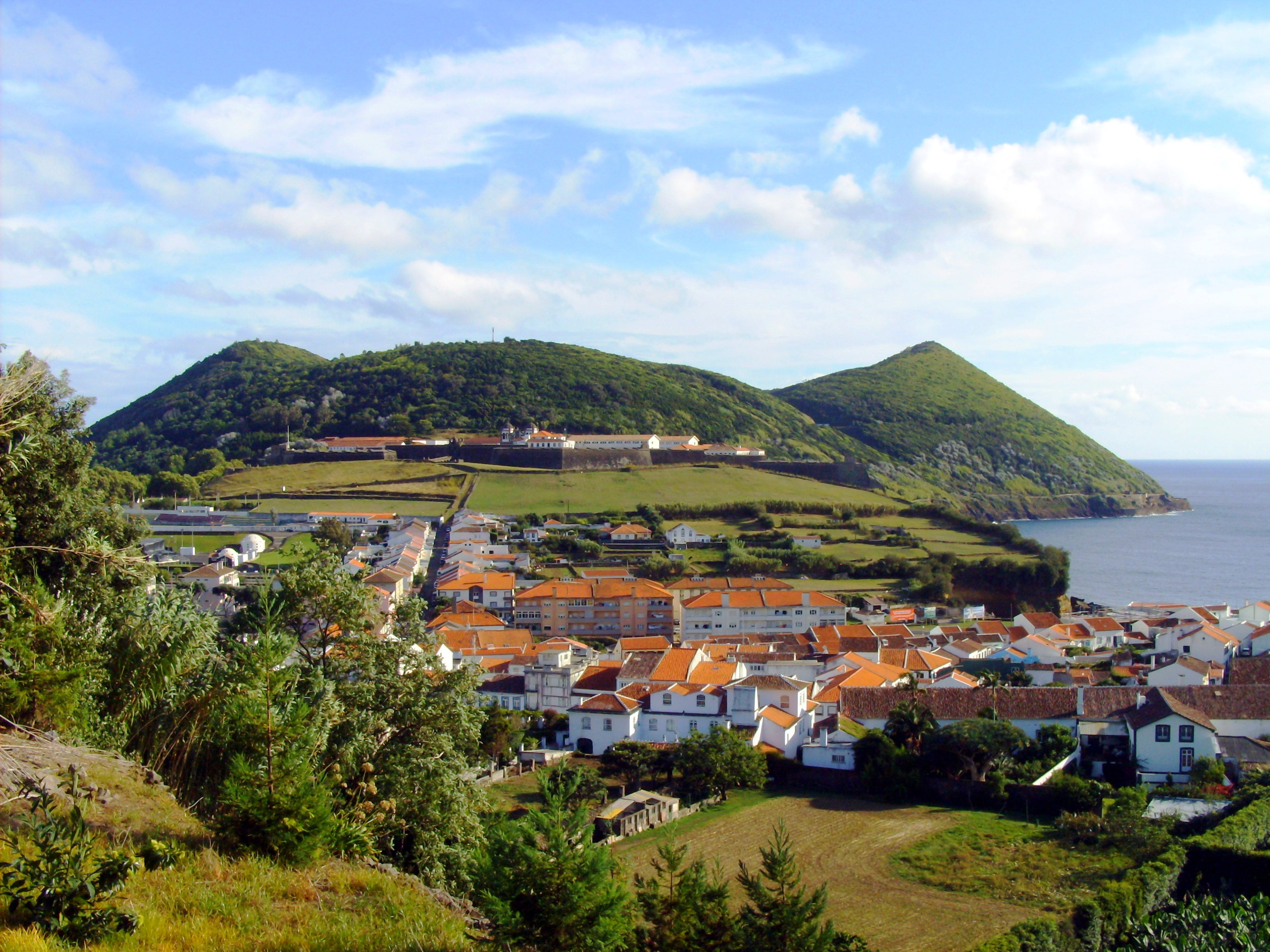 Fortaleza de São João Baptista do Monte Brasil, Angra do Heroísmo, ilha Terceira, Açores: panorâmica do istmo.